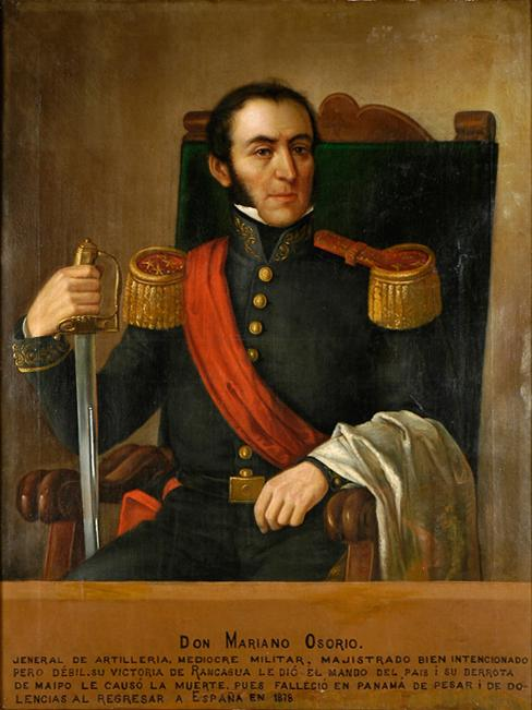 Óleo oficial de los gobernadores de Chile, forma parte de la coleccion de retratos de los gobernadores de Chile. La Colecciòn de Retratos de los Presidentes del Coloniaje. The collection of Portraits of the Governors of Chile is in the Museo Histórico Nacional (Chile) and was commissioned by Benjamín Vicuña Mackenna for the 1873 Colonial Exhibition and painted by various artists. It replaces a series of portraits of Chile's colonial governors dating from the colonial era which was destroyed during the wars for independence. [1].